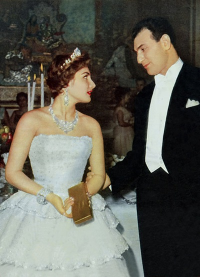 اردشیر زاهدی و شهناز پهلوی